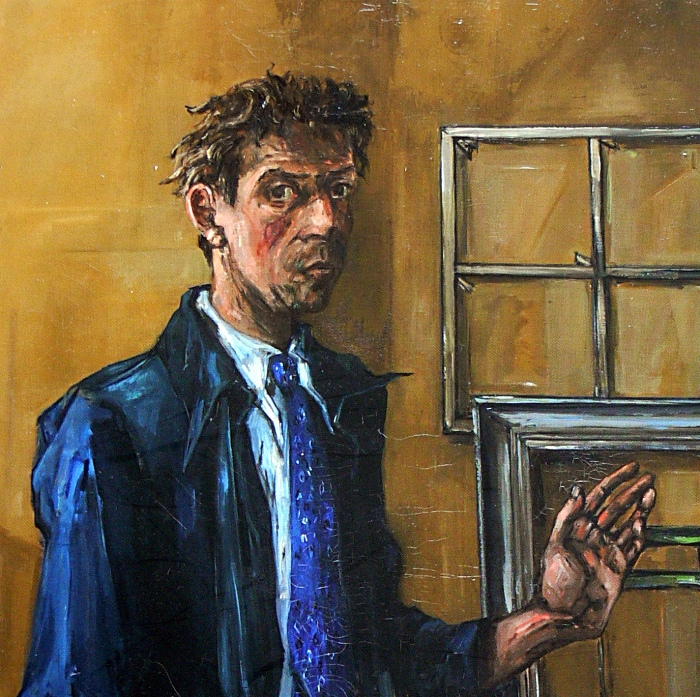 Fragment d'un autoportrait de Francis Gruber